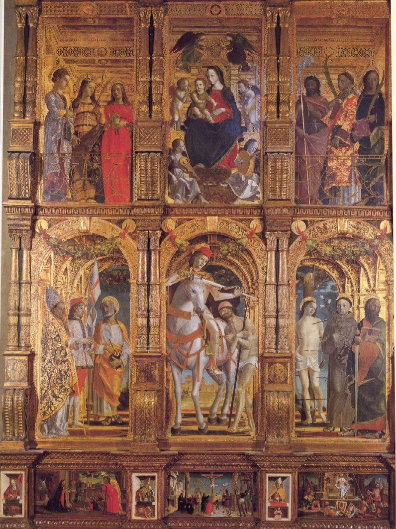 Polyptych